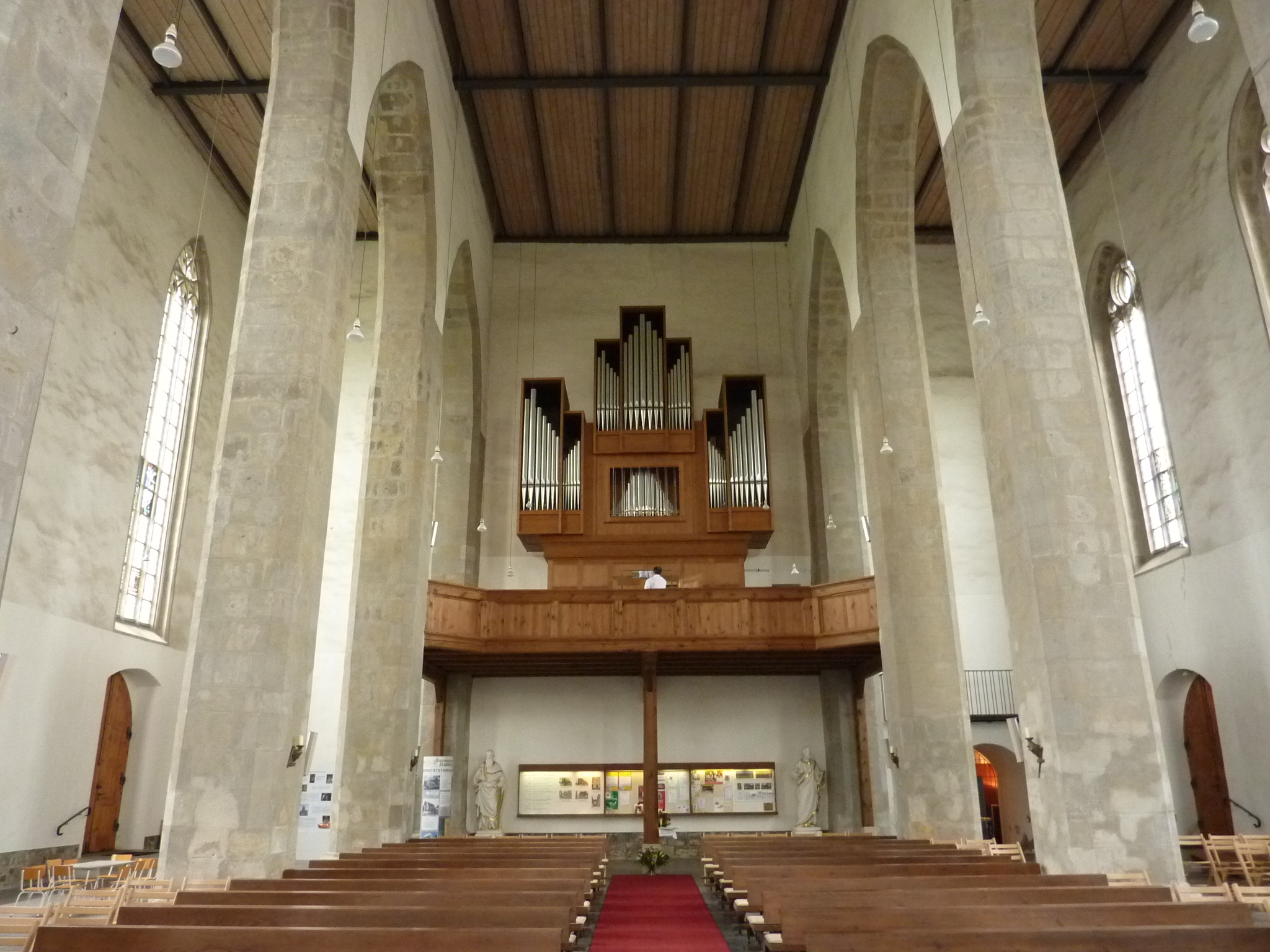 Petrikirche (Magdeburg)